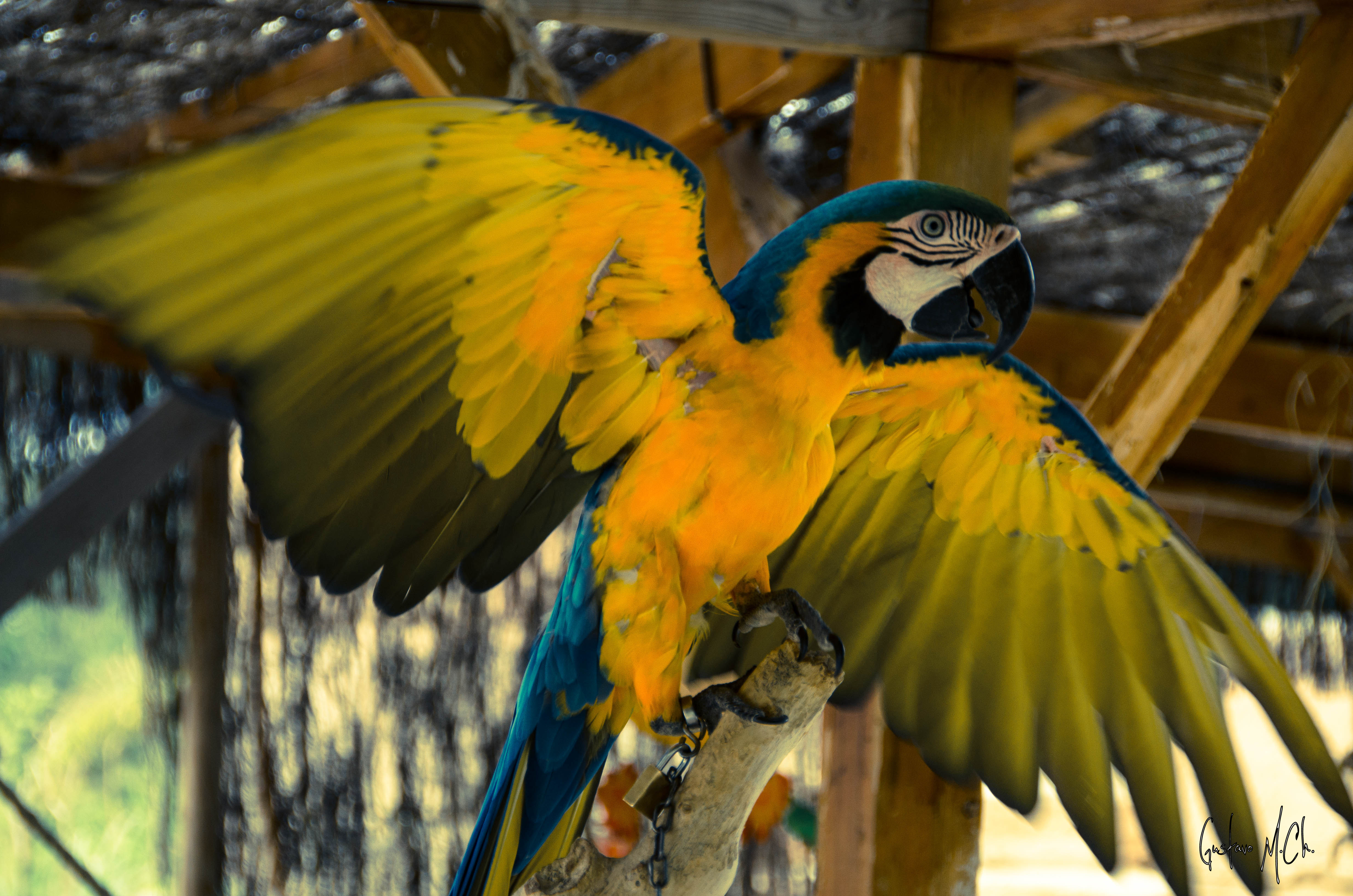 Terra Natura